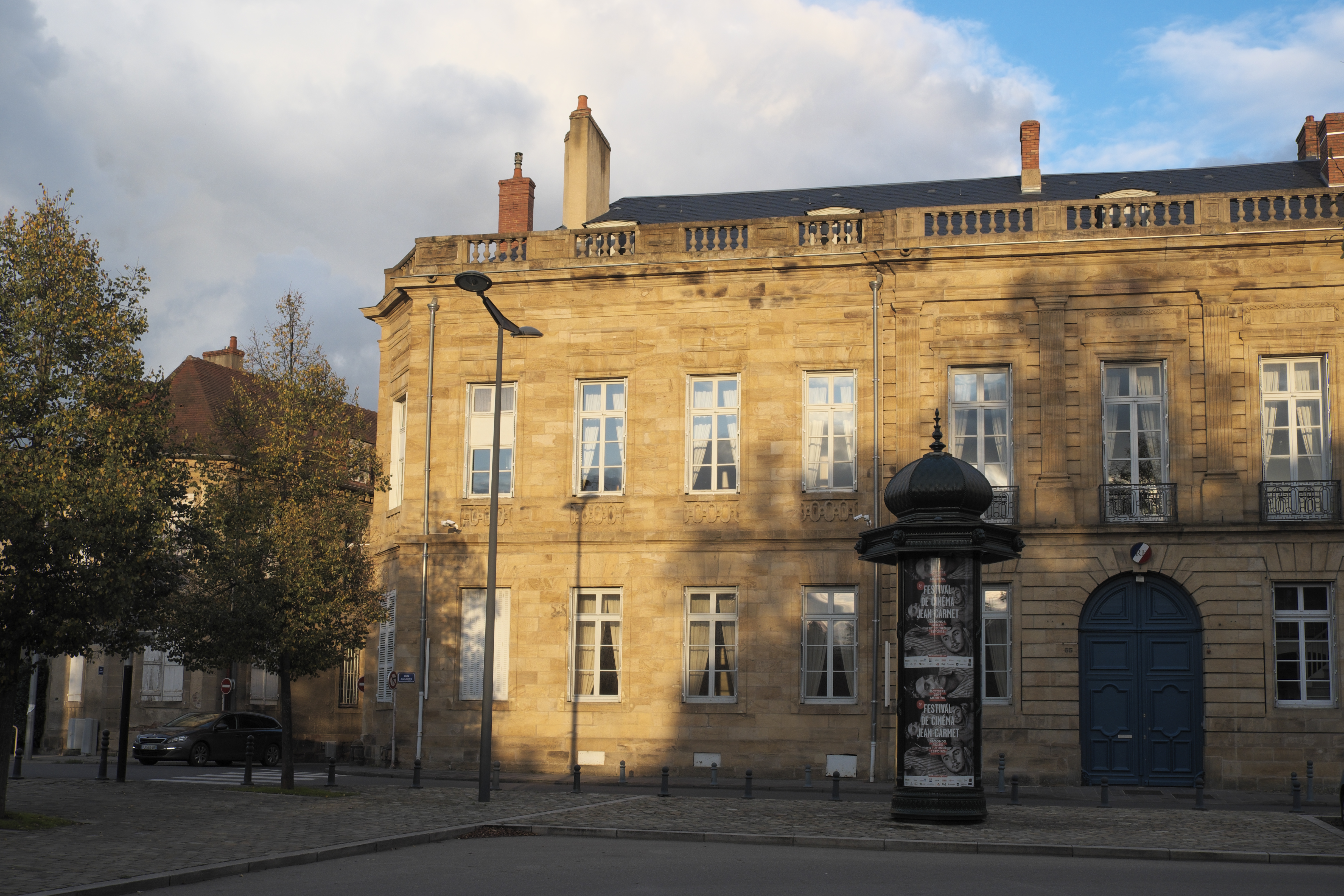 Sitz der Präfektur des Départements Allier, Cours Jean Jaurès, in Moulins im Département Allier (Auvergne-Rhône-Alpes/Frankreich)